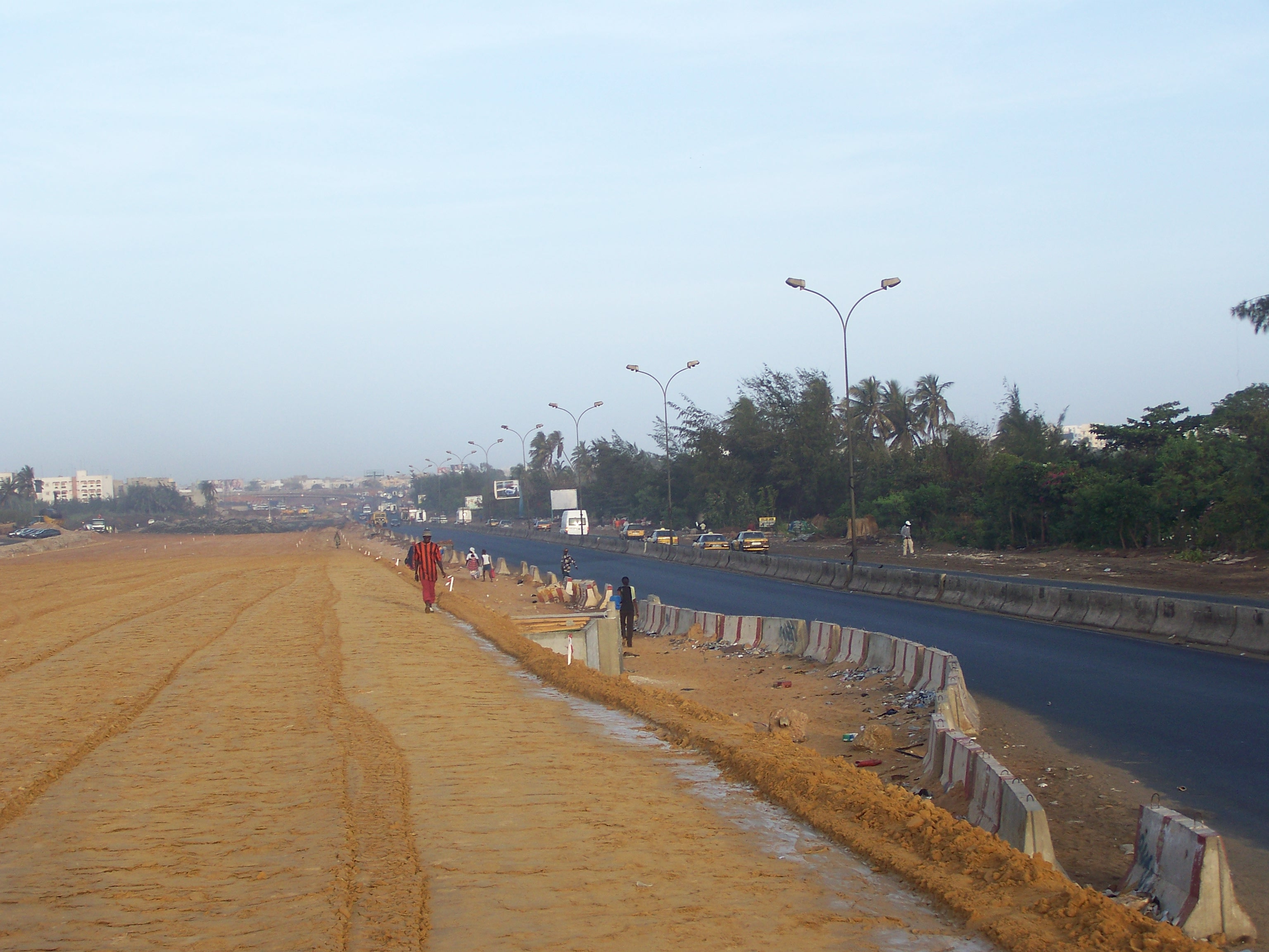 Travaux autoroute à peage dakar